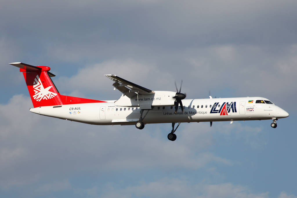 C9-AUL DHC8-400 LAM